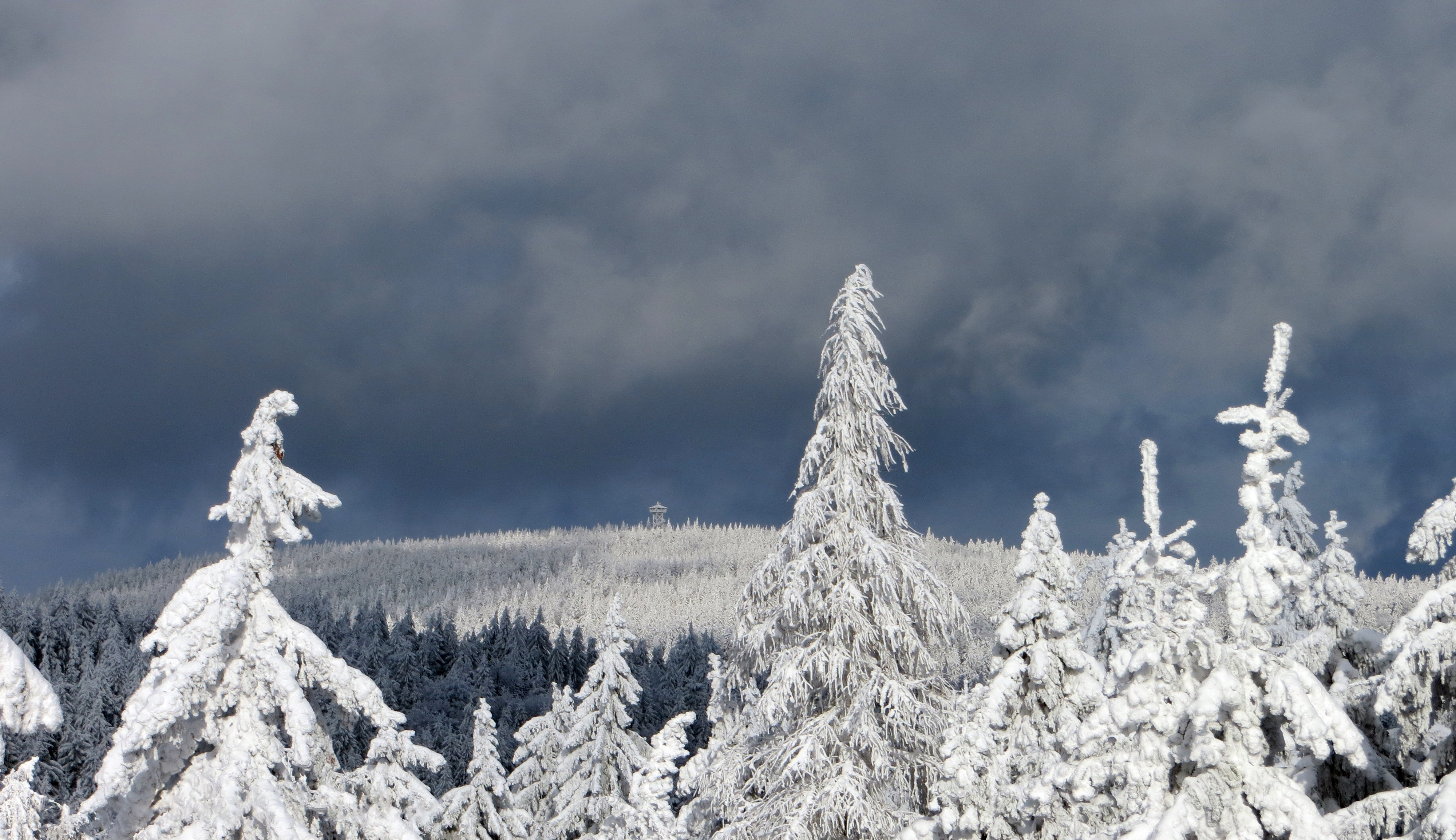 Blick vom Saubadfelsen 858m zum Oberpfalzturm auf der Platte 946m.